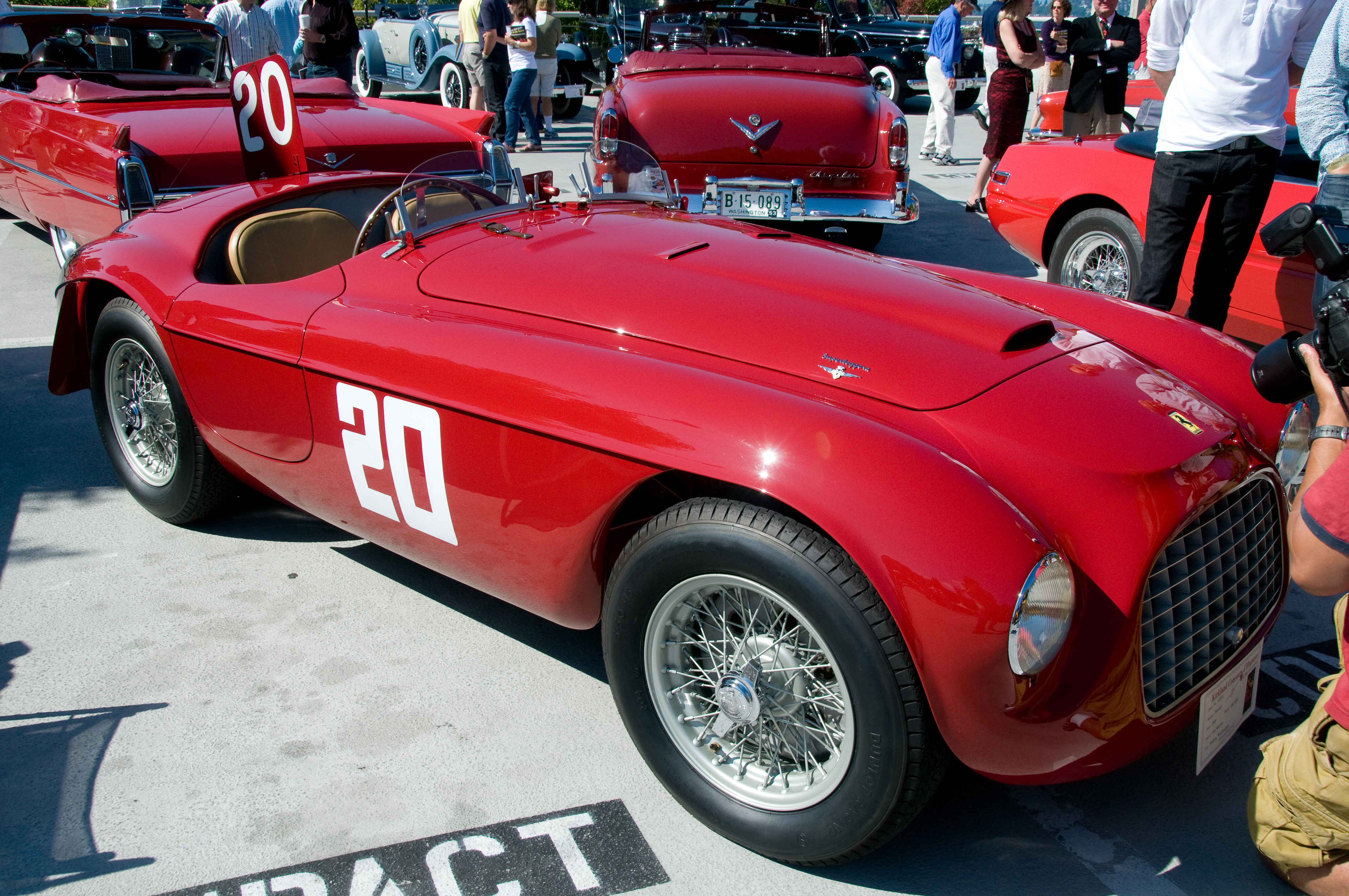 Ferrari 166 MM carrossée par Touring